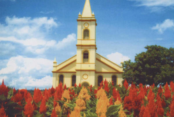 Igreja do começo do século XX em Catalão, Goiás